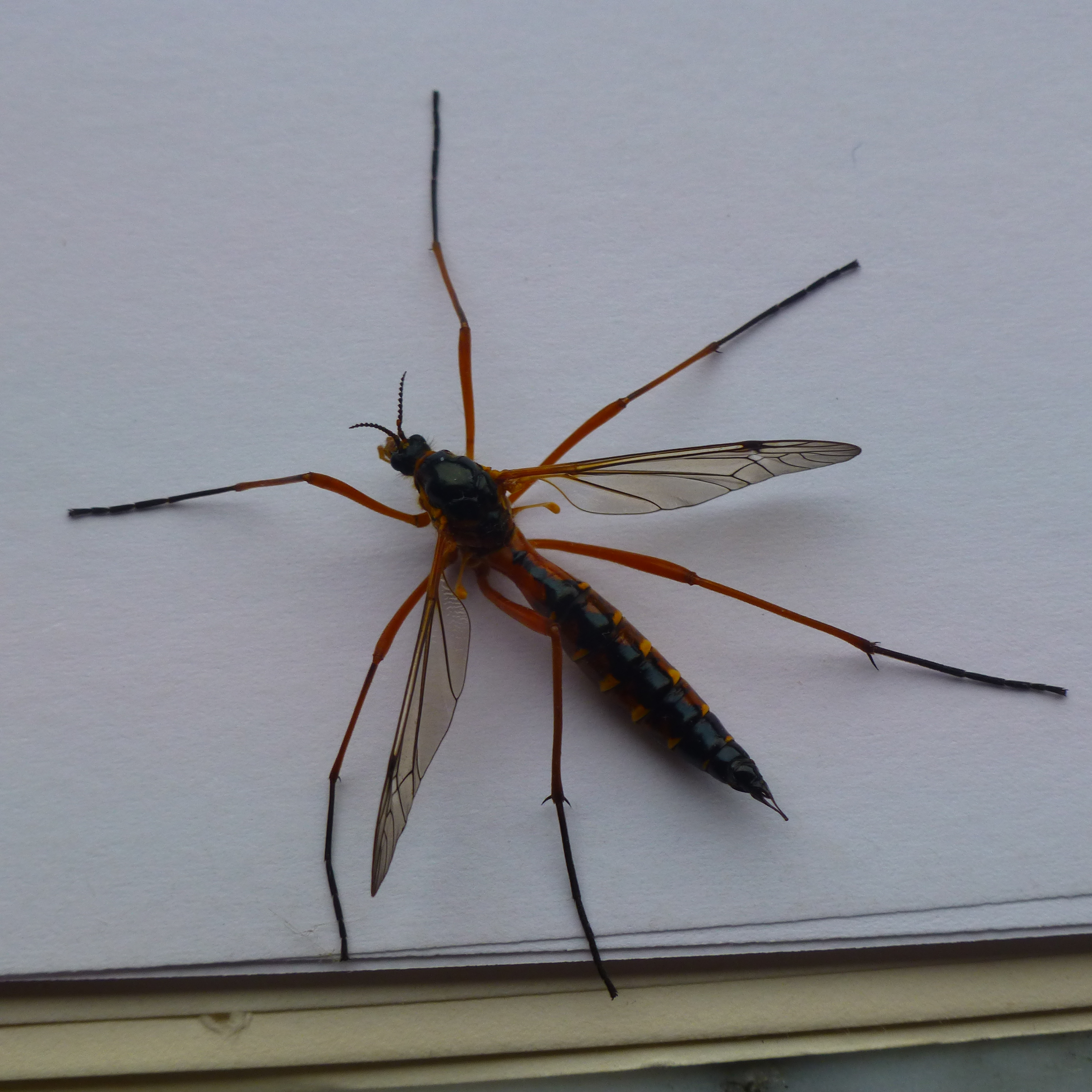 Ctenophora pectinicornis femelle (Tipulidae)